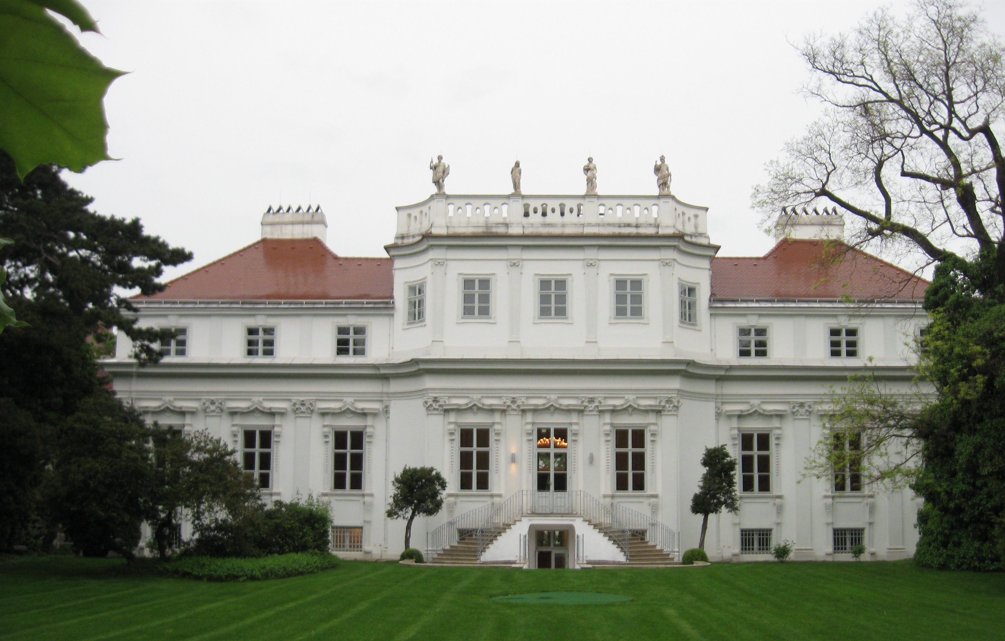 Palais Schönburg, Wien-Wieden, Rainergasse 11; Ansicht vom Garten